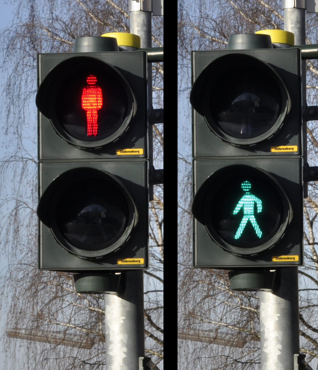 Fußgängerampel, Göttingen, Nikolausberger Weg/Kreuzbergring, 31.12.2013. Fotos: Francisco Welter-Schultes.